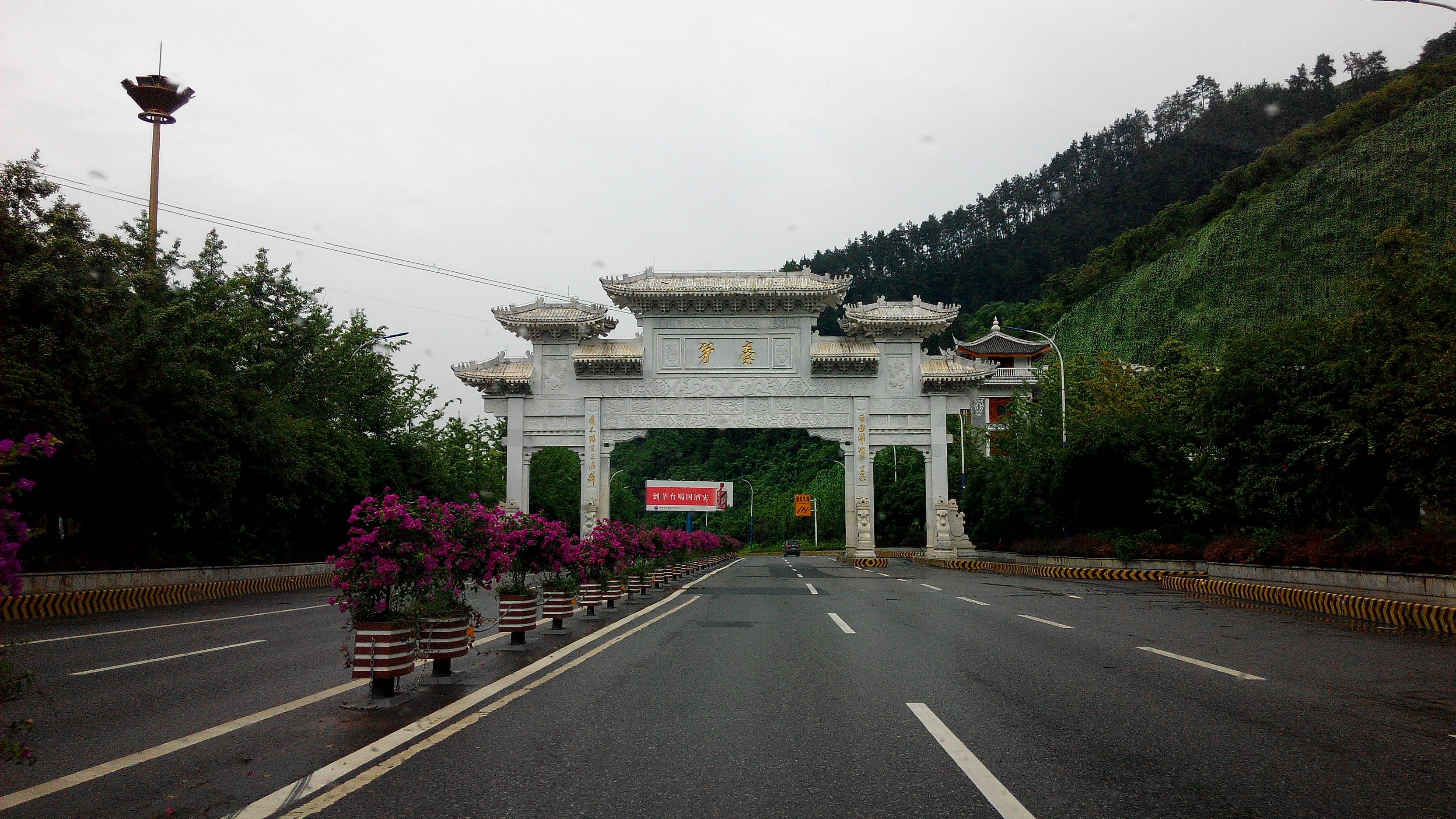 贵州省遵义市仁怀市茅台镇